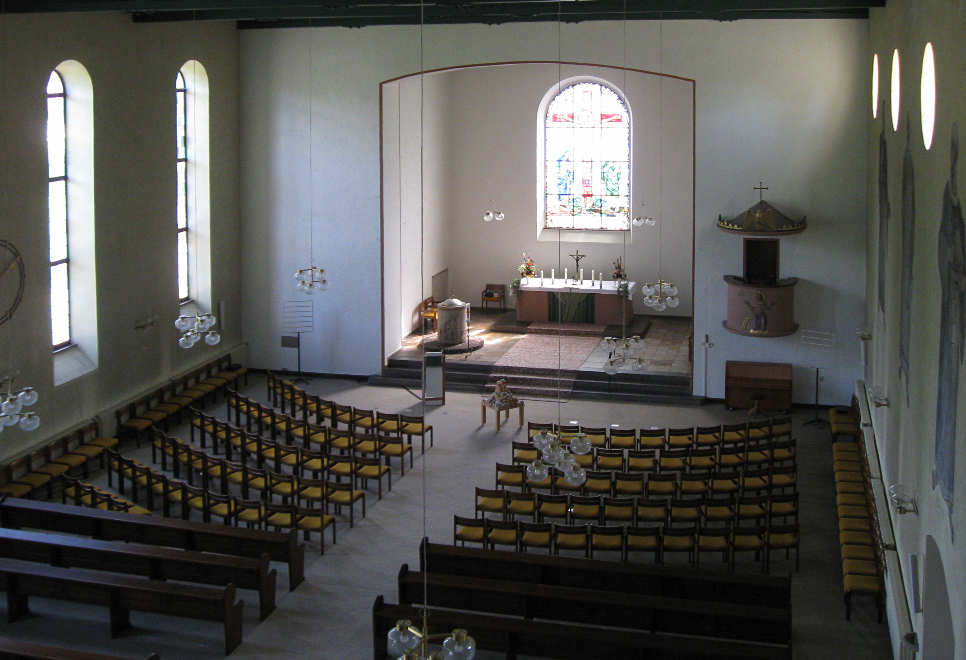 Fassberg Kirche Blick zum Altar